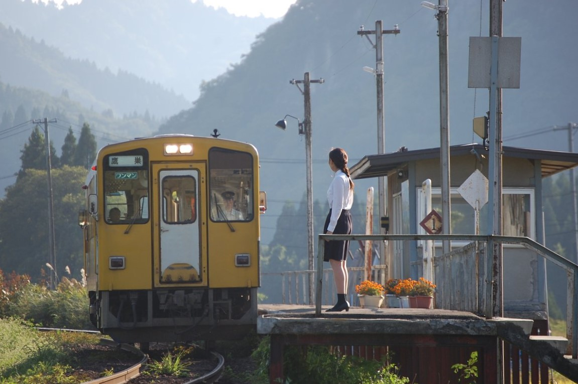 秋田内陸縦貫鉄道前田南駅